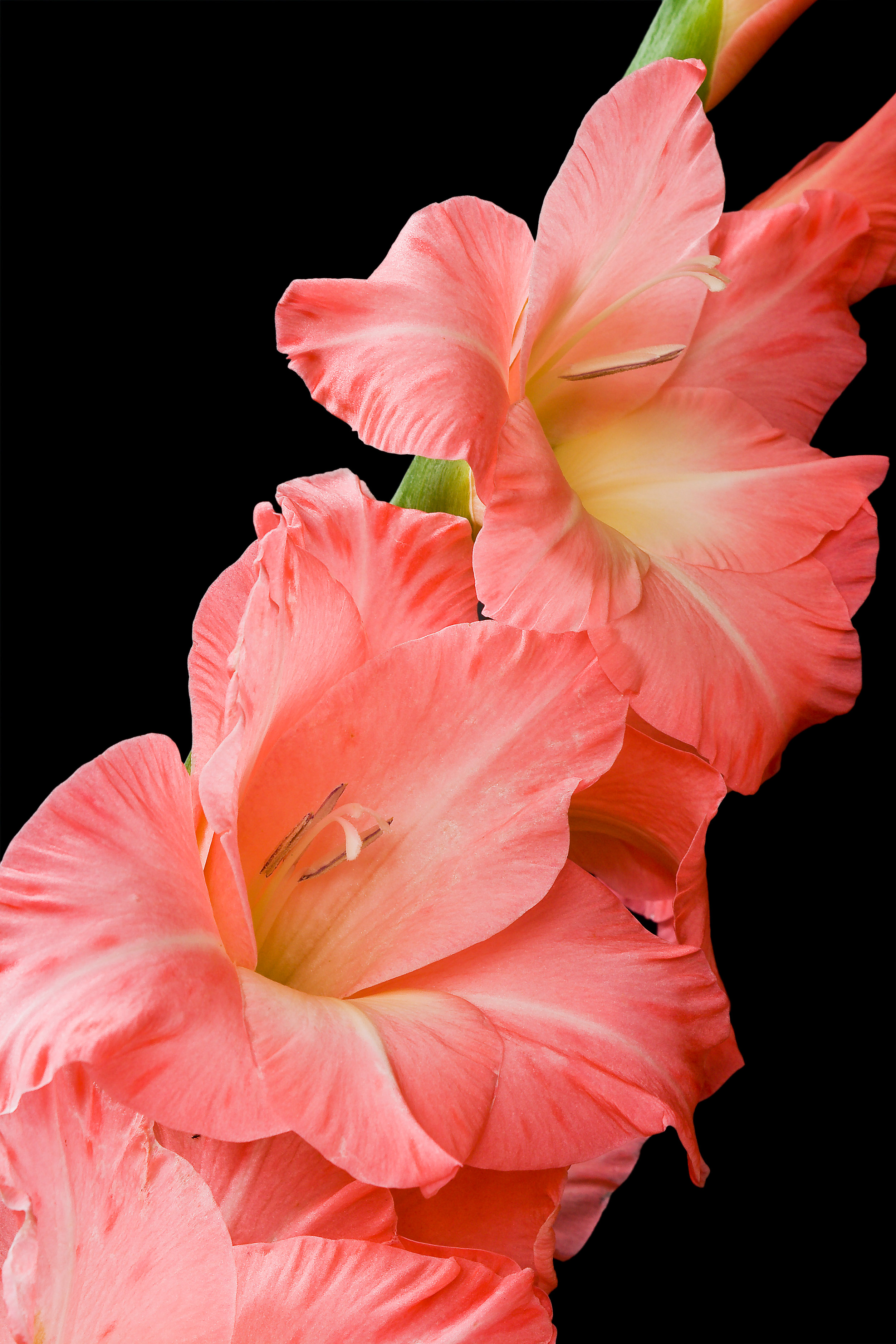 Гладиолус розовый голландской селекции